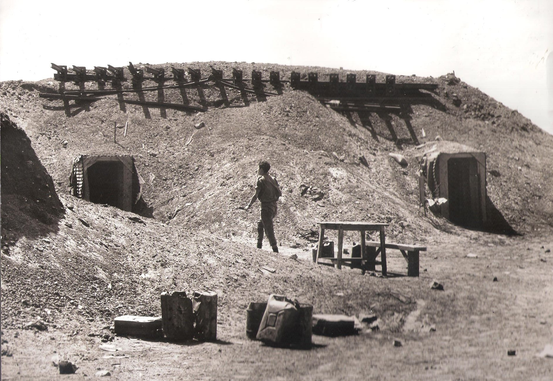 מוצב קדמי "בודפשט" בתקופת מלחמת ההתשה